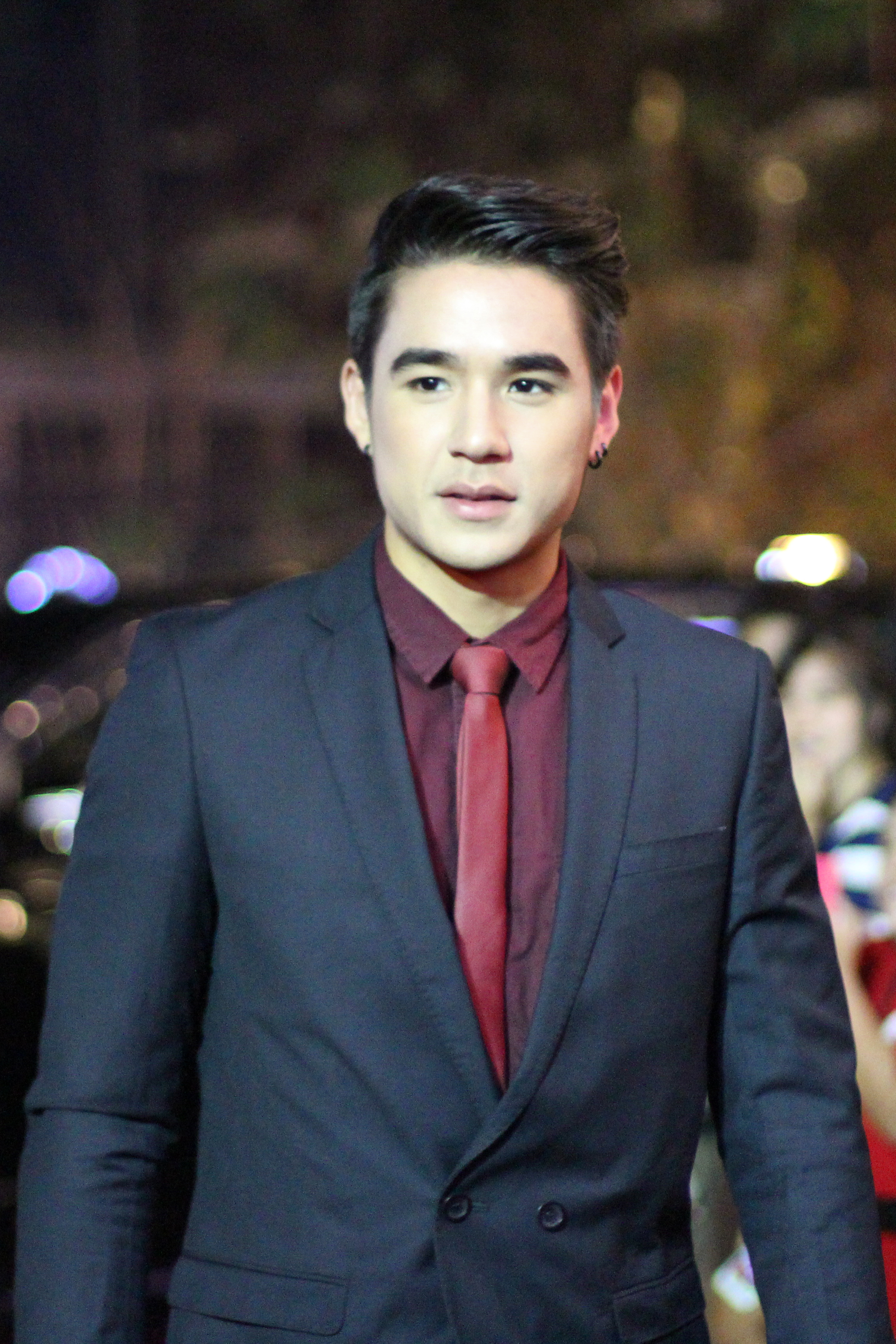 © Cancanisstory This photo is my copyright. I'm Not violations.